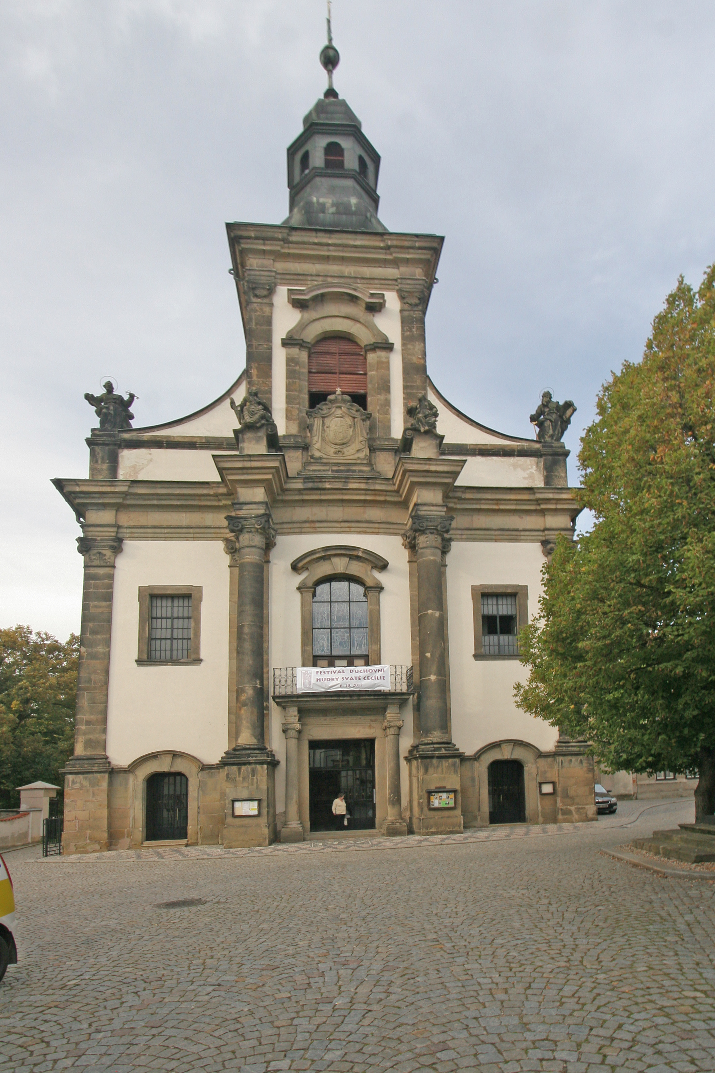 Kostel Nanebevzetí Panny Marie, Ústí nad Orlicí, Kostelní.